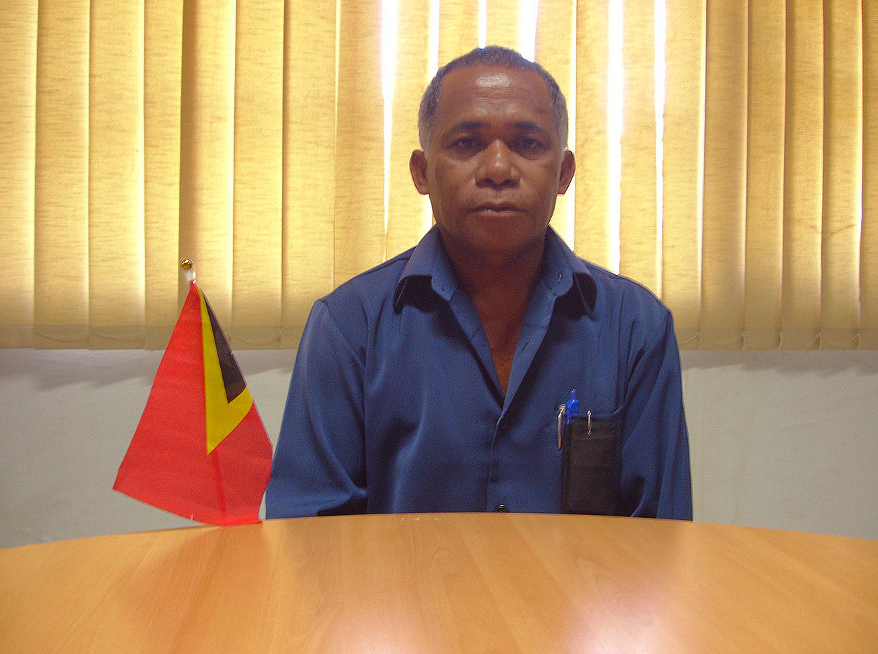 Laurindo da Silva, Administrator des Subdistrikts Maubara